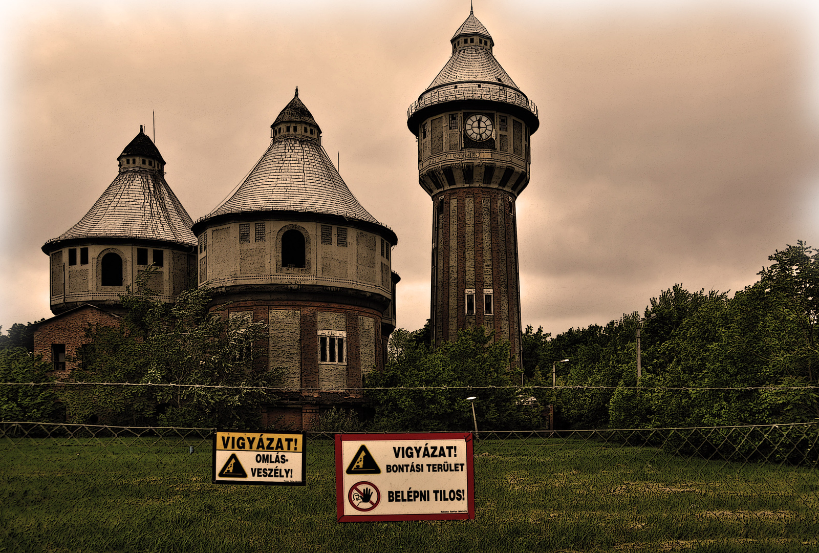 víztorony (Budapest 3, Gázgyár utca) This is a photo of a monument in Hungary. Identifier: 15755